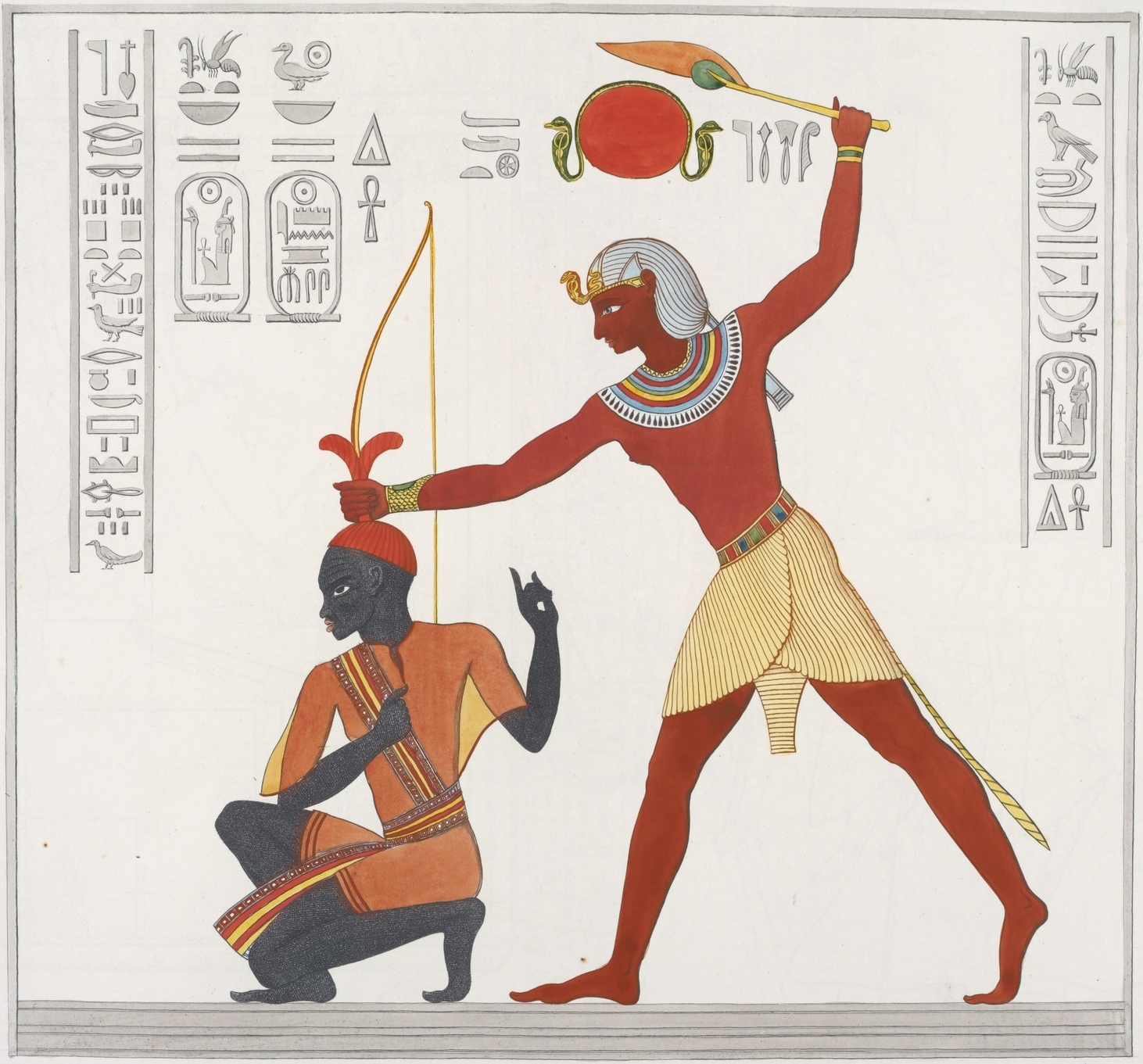 Abzeichnung eines Reliefs im Tempel Bet el-Wali, Ägypten